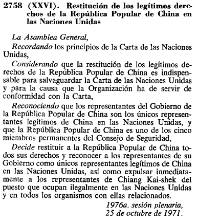 Texto en español de la resolución 2758 de la asamblea general de la ONU.